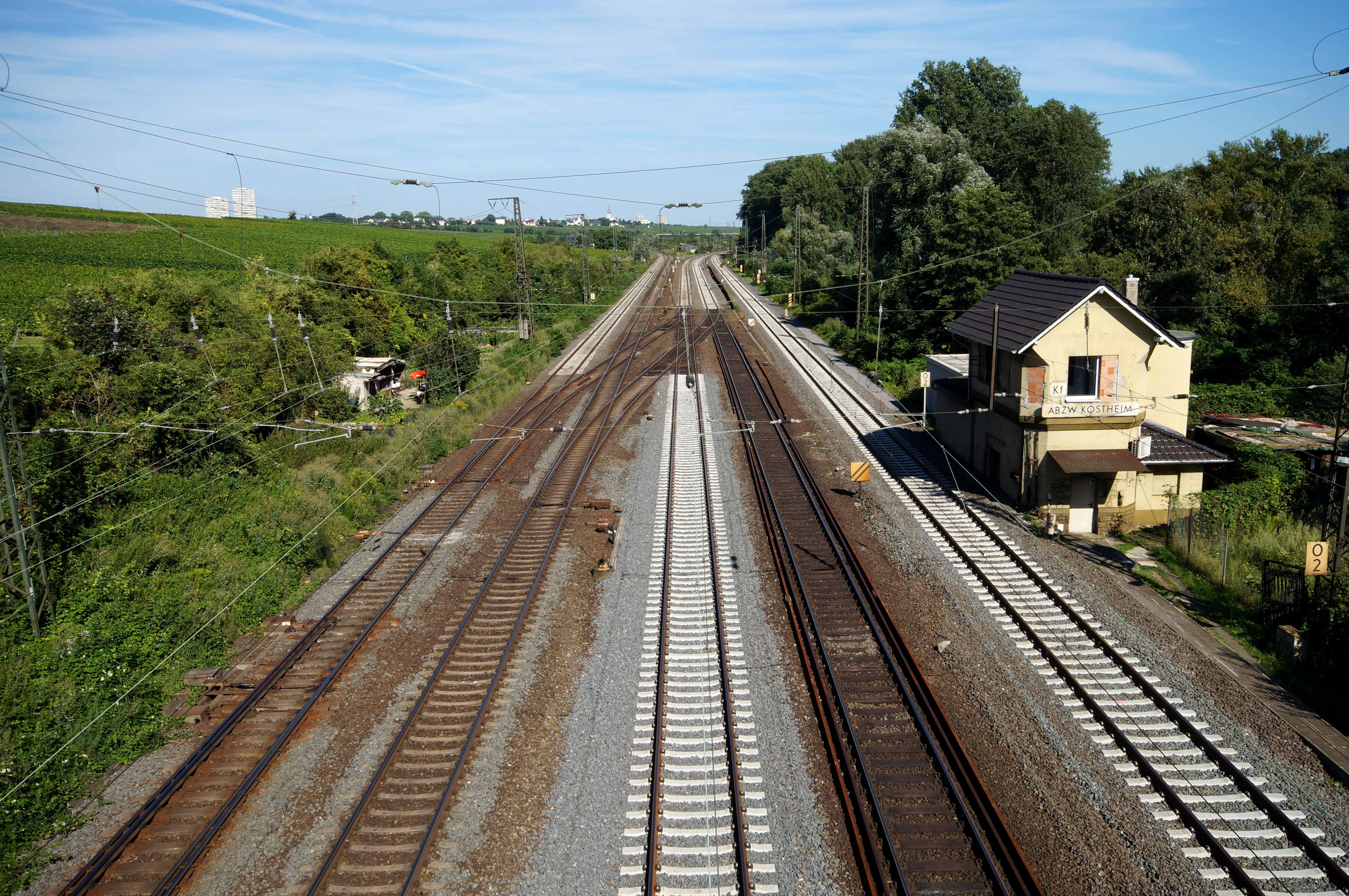 Gleise der Abzweigstelle Kostheim in Mainz-Kostheim in Wiesbaden von der Kommerzienrat-Disch-Brücke aus, Blickrichtung Ost: Bei der Abzweigstelle Kostheim überquert die Umgehungsbahn Mainz den Main und die Taunus-Eisenbahn: Die beiden linken Gleise sind Gleise der Umgehungsbahn Mainz, die beiden rechts daneben liegenden Gleise gehören zur Taunus-Eisenbahn, das rechte Gleis ist ein Verbindungsgleis der Taunus-Eisenbahn zur Eisenbahnbrücke Hochheim